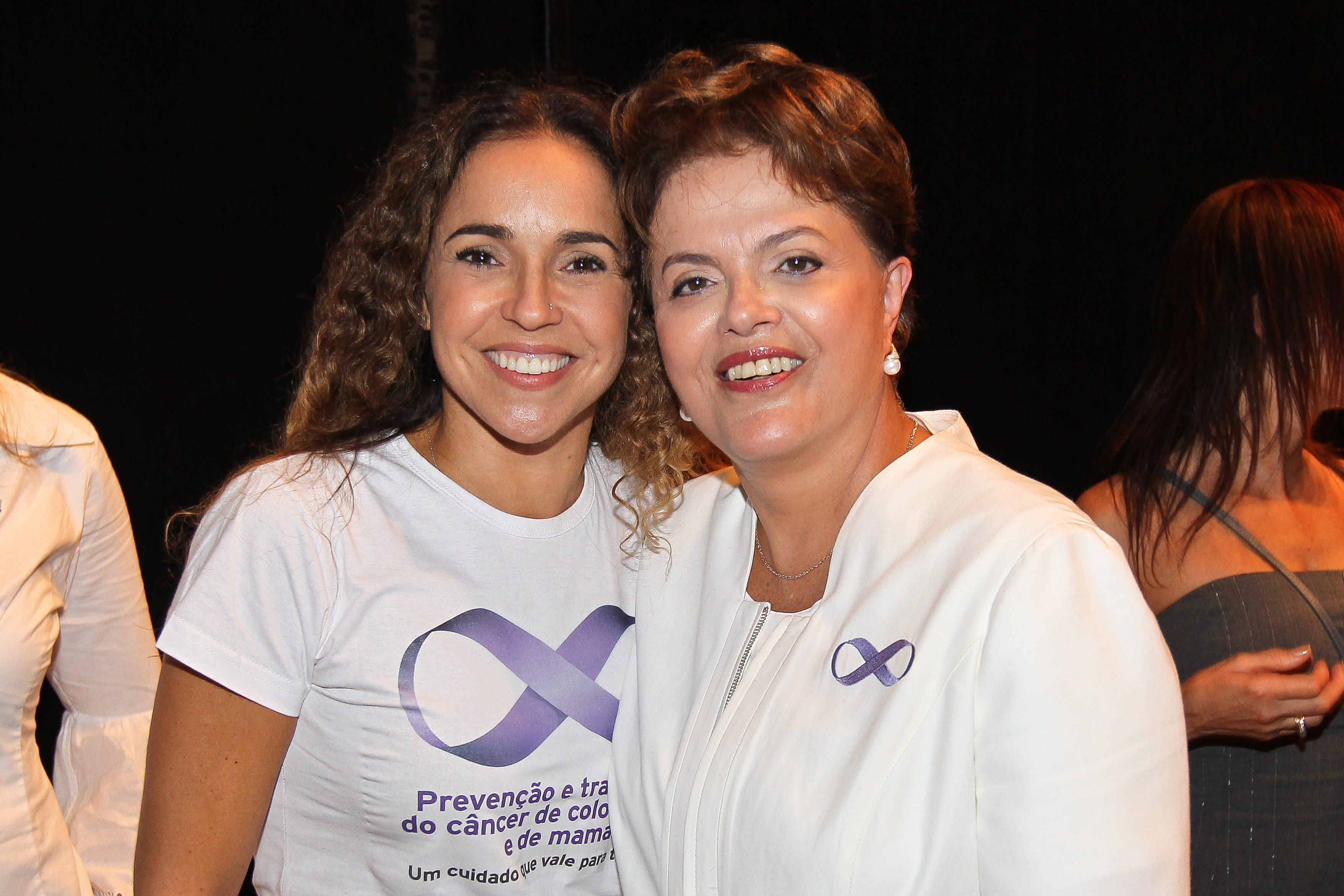 Manaus - AM, 22/03/2011. Presidenta Dilma Rousseff posa pra foto com a cantora Daniela Mercuri durante o Lançamento do Programa de Fortalecimento da Rede de Prevenção, Diagnóstico e Tratamento do Câncer de Colo de Útero e de Mama no Teatro Amazonas. Foto: Roberto Stuckert Filho/PR